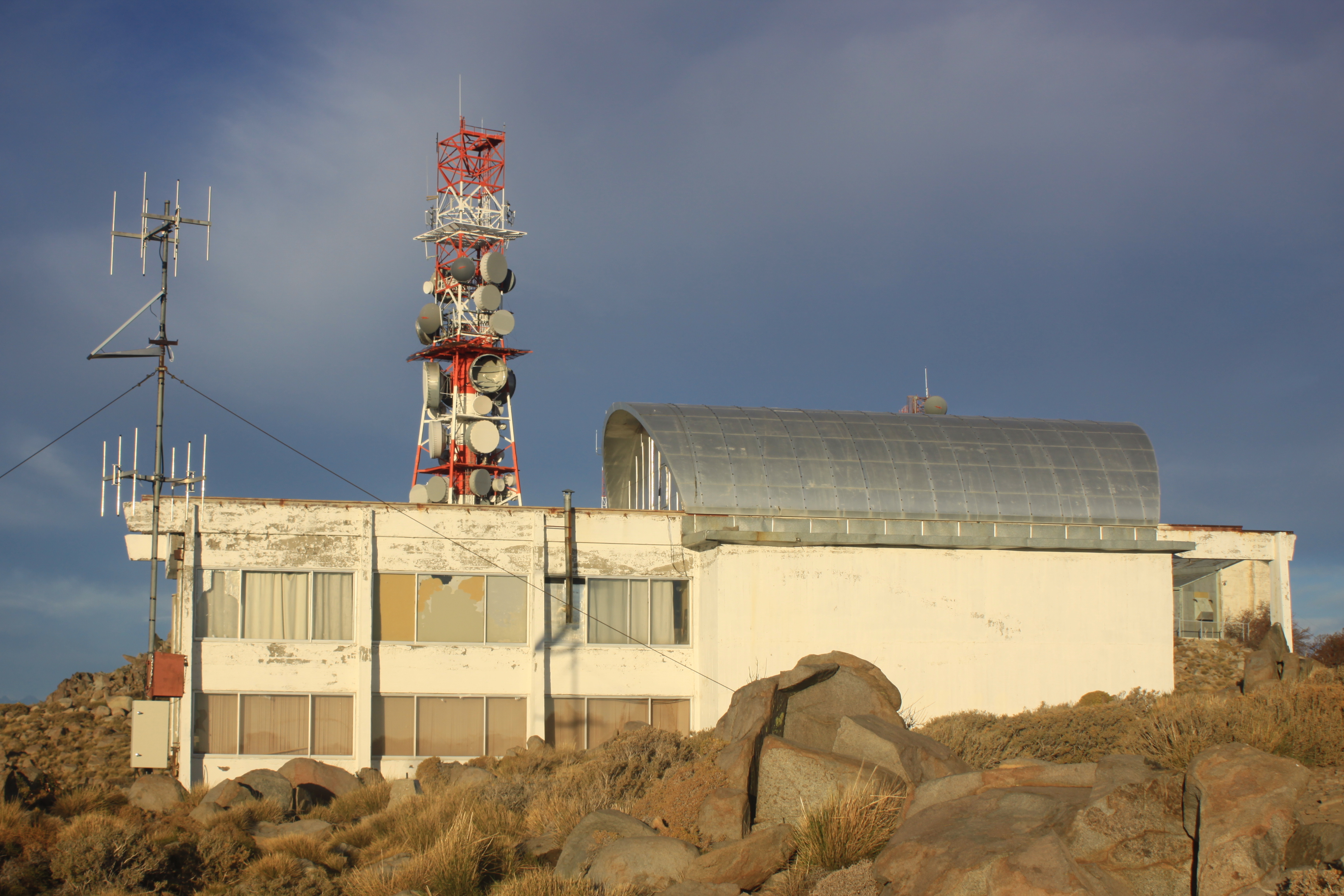 Observatorio astronómico El Roble